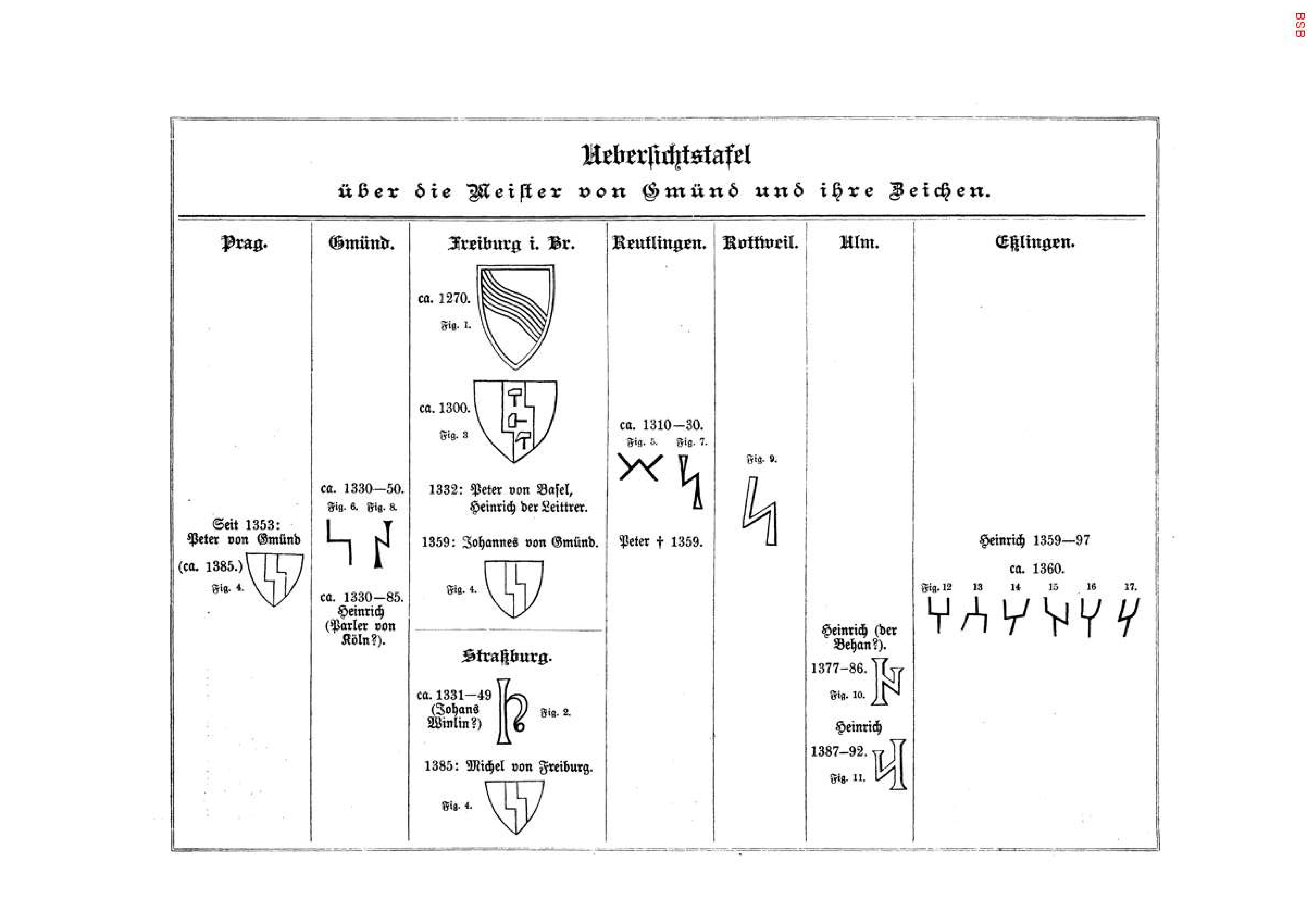 Uebersichtstafel ueber die Meister von Gmuend und ihre Zeichen. In: Korrespondenzblatt des Gesamtvereins der Deutschen Geschichts- und Alterthumsvereine. Bd.: 42. 1894, Berlin 1894, S. 13